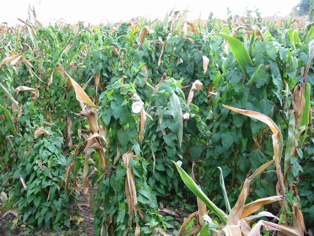 Champ de maïs envahi par le liseron des haies Calystegia sepium.